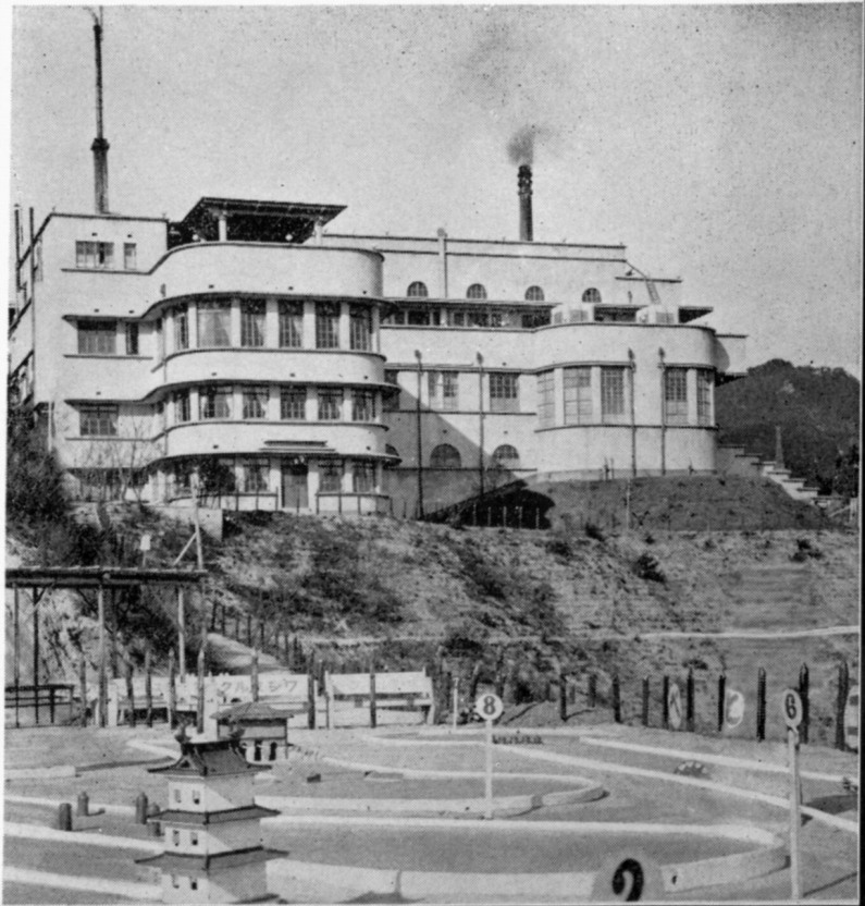 「開設当時の摩耶山温泉」と説明がある。後の摩耶観光ホテル。